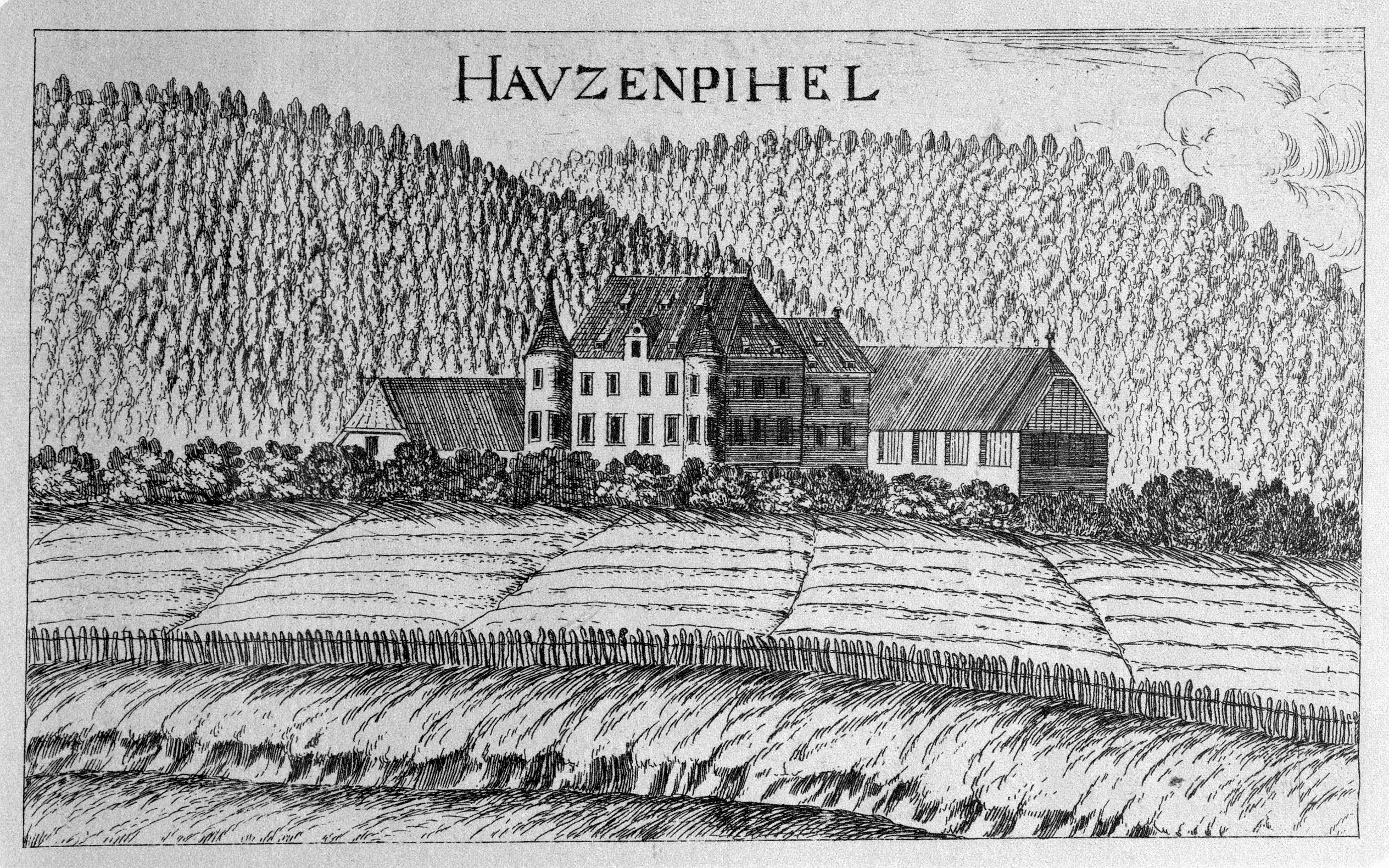 G. M. Vischers Käyserlichen Geographi, Topographia Ducatus Stiriae, Das ist: Eigentliche Delineation / und Abbildung aller Städte / Schlösser / Marcktfleck / Lustgärten / Probsteyen / Stiffter / Clöster und Kirchen / so es sich im Herzogthumb Steyrmarck befinden; Und anjetzo Umb einen billichen Preyß zu finden seynd Bey Johann Bitsch Universitäts Buchhandlern / Auff dem Juden=Platz bey der guldenen Saulen. Graz 1681 Die Nummerierung der Dateien folgt der alphabetischen Reihung der Ortsnamen